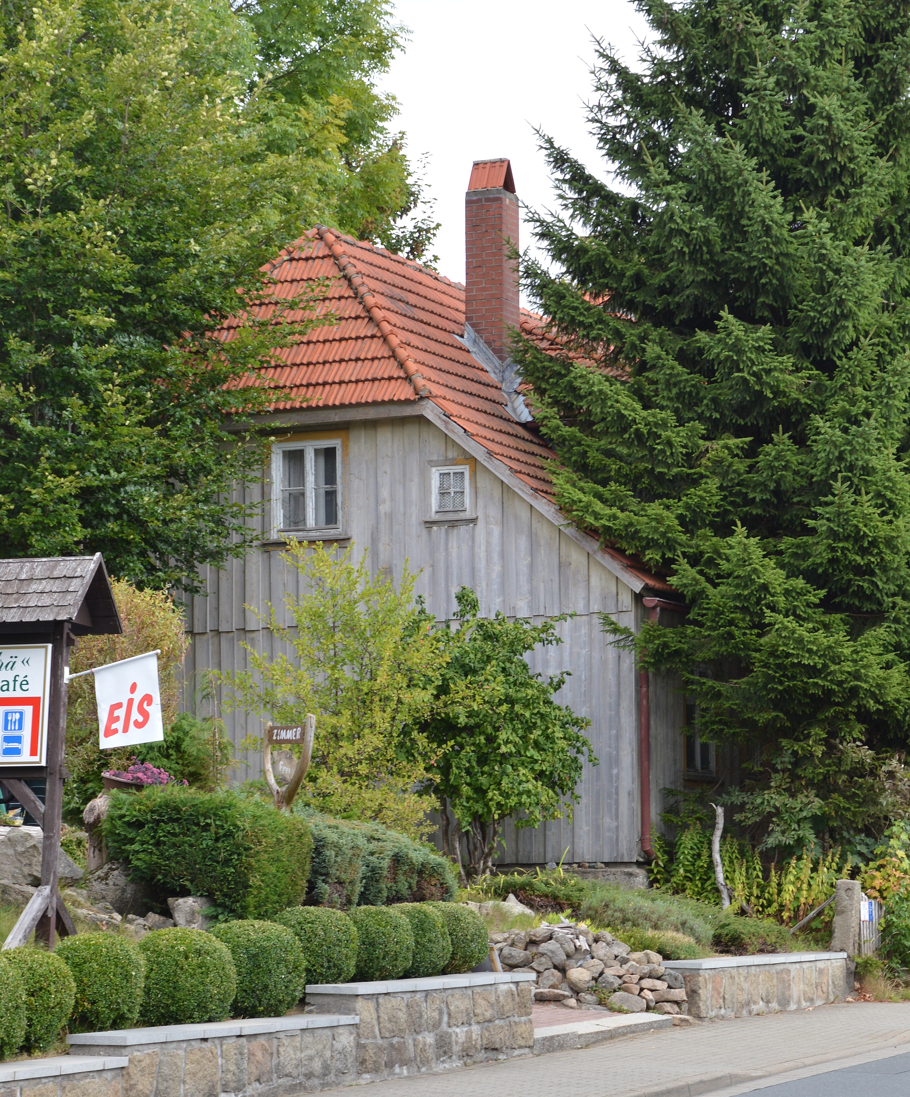 Haus Brockenstraße 11 in Schierke